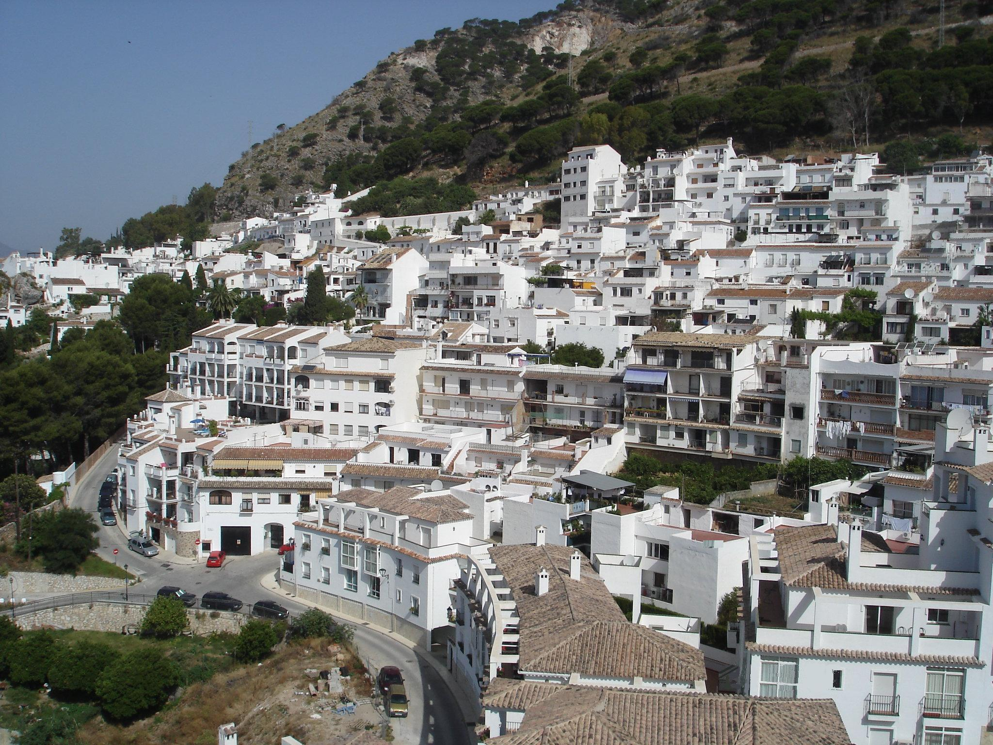 ville de Mijas côté Ouest (Province de Malaga) Auteur : Jean-Claude Perez